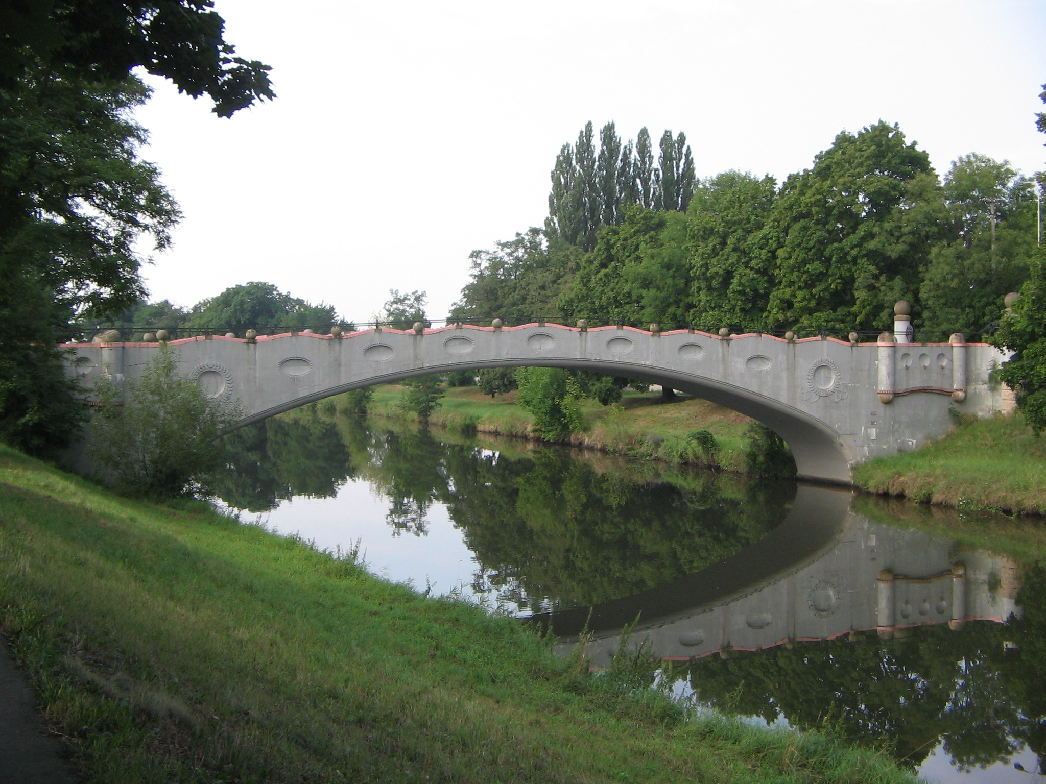 Silniční most přes Labe, Hradec Králové-Plácky.